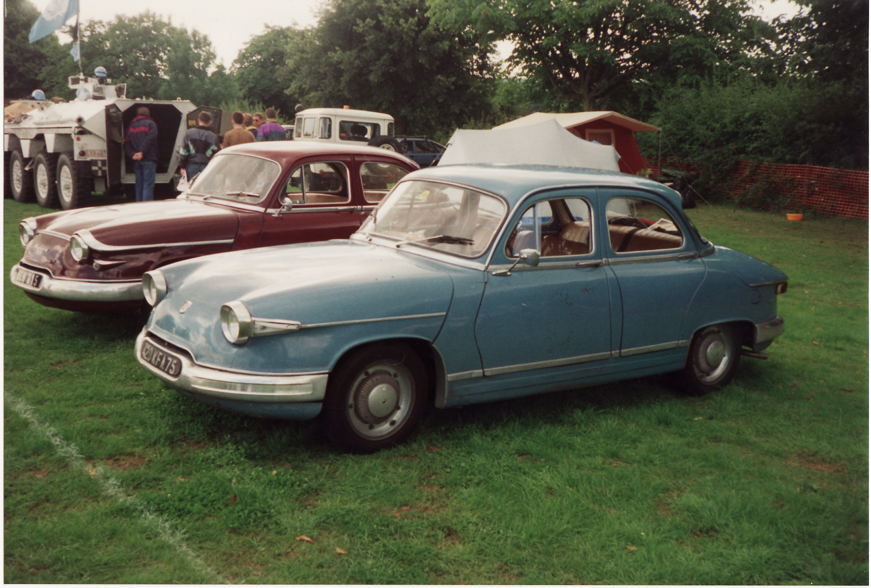 Panhard 17B Relmax & PL17